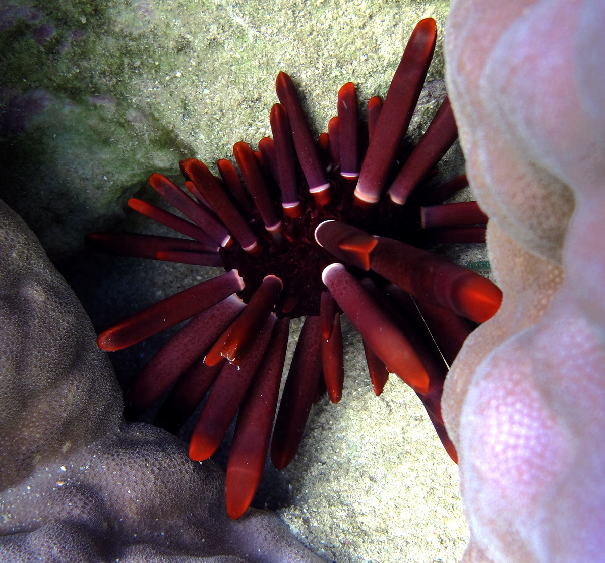 Oursin-crayon (Heterocentrotus mamillatus) à la Réunion.